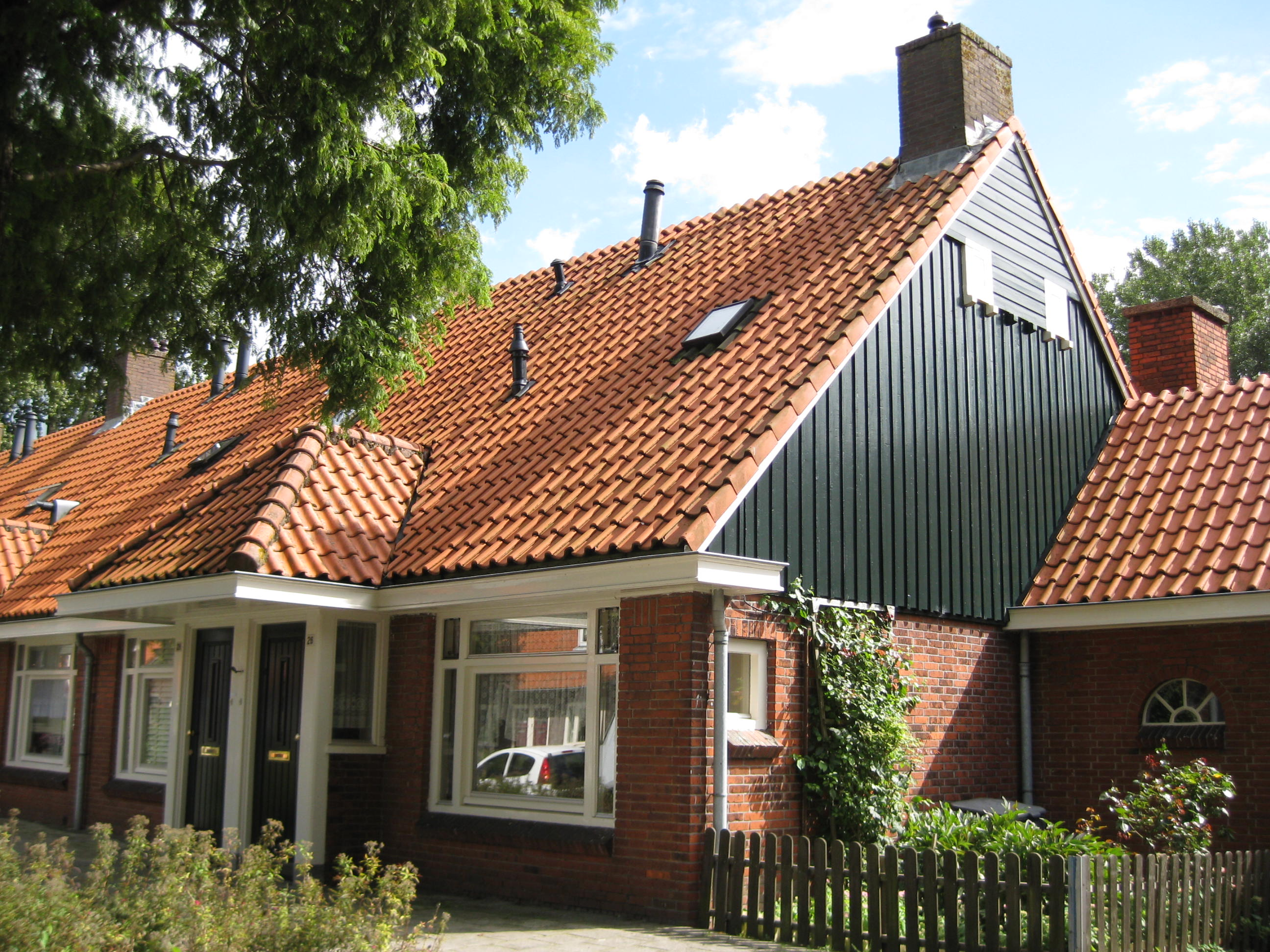 Volendammerweg 26, Amsterdam-Noord